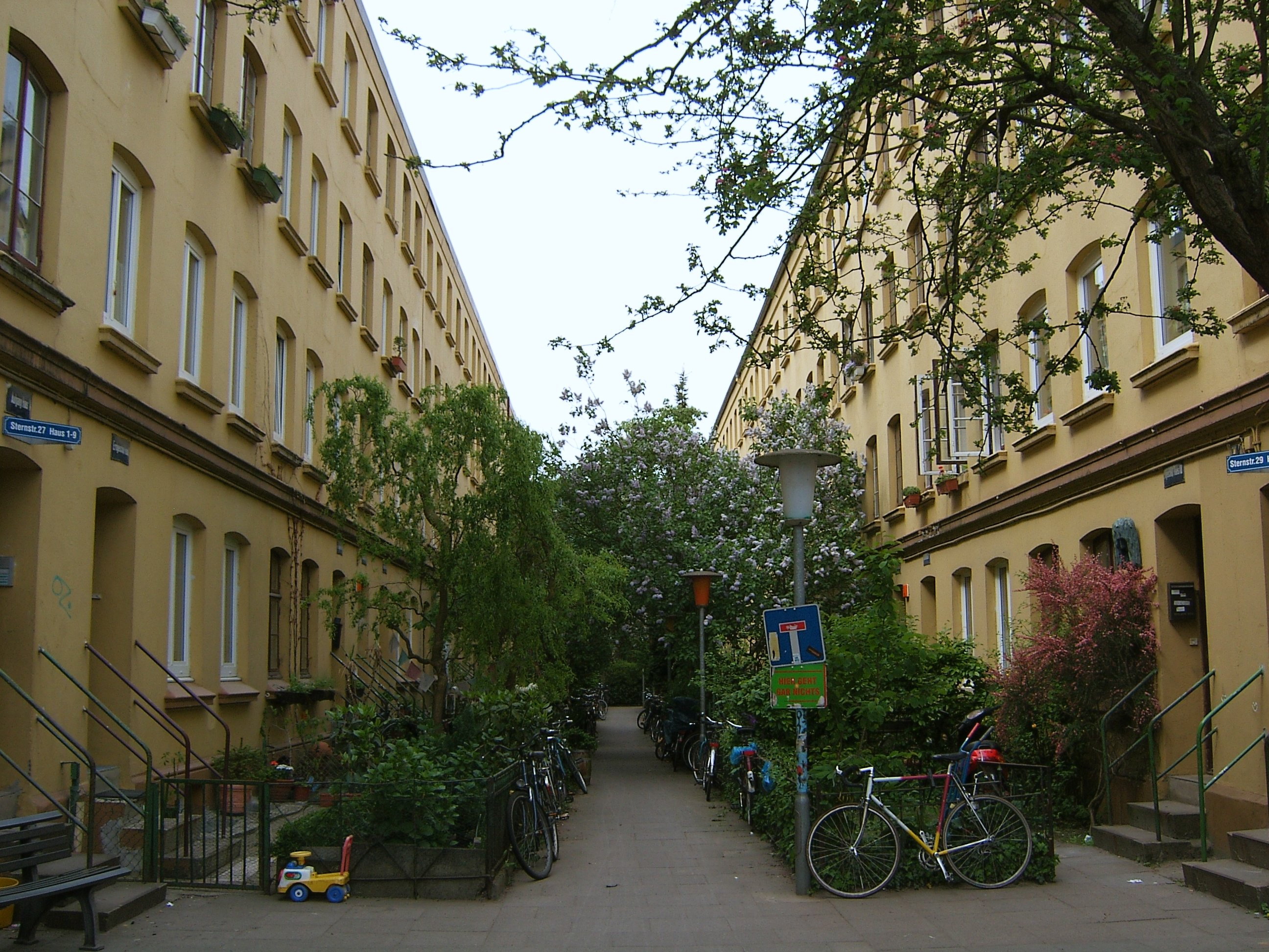 Terrasse in der Sternstraße im Karolinenviertel in St. Pauli